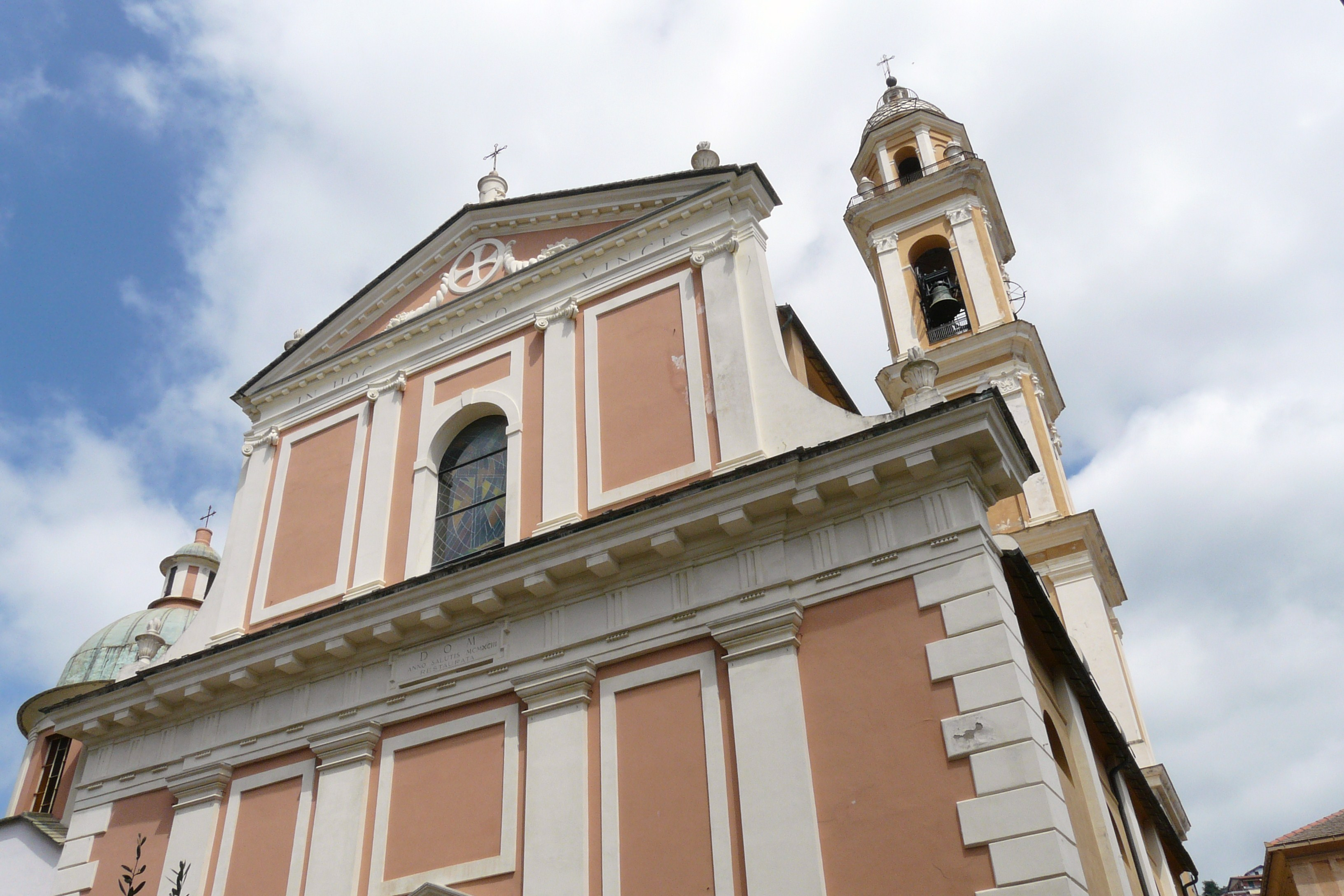 Chiesa di Santa Croce, Moneglia, Liguria, Italia